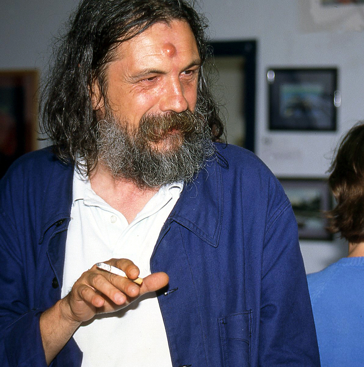 Jean Tirilly, lors de la Foire aux Croûtes organisée par Arts Guil en août 1998 au Guilvinec, à l'Abri du Marin